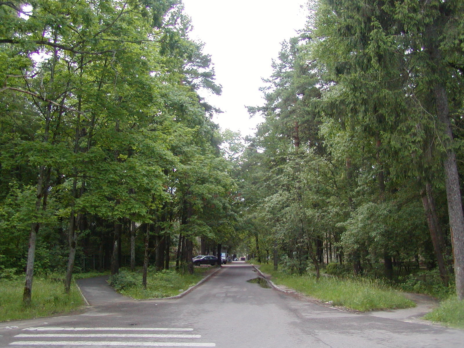 Вид улицы Мигунова в Обнинске от школы № 1. Слева и справа за деревьями дома.